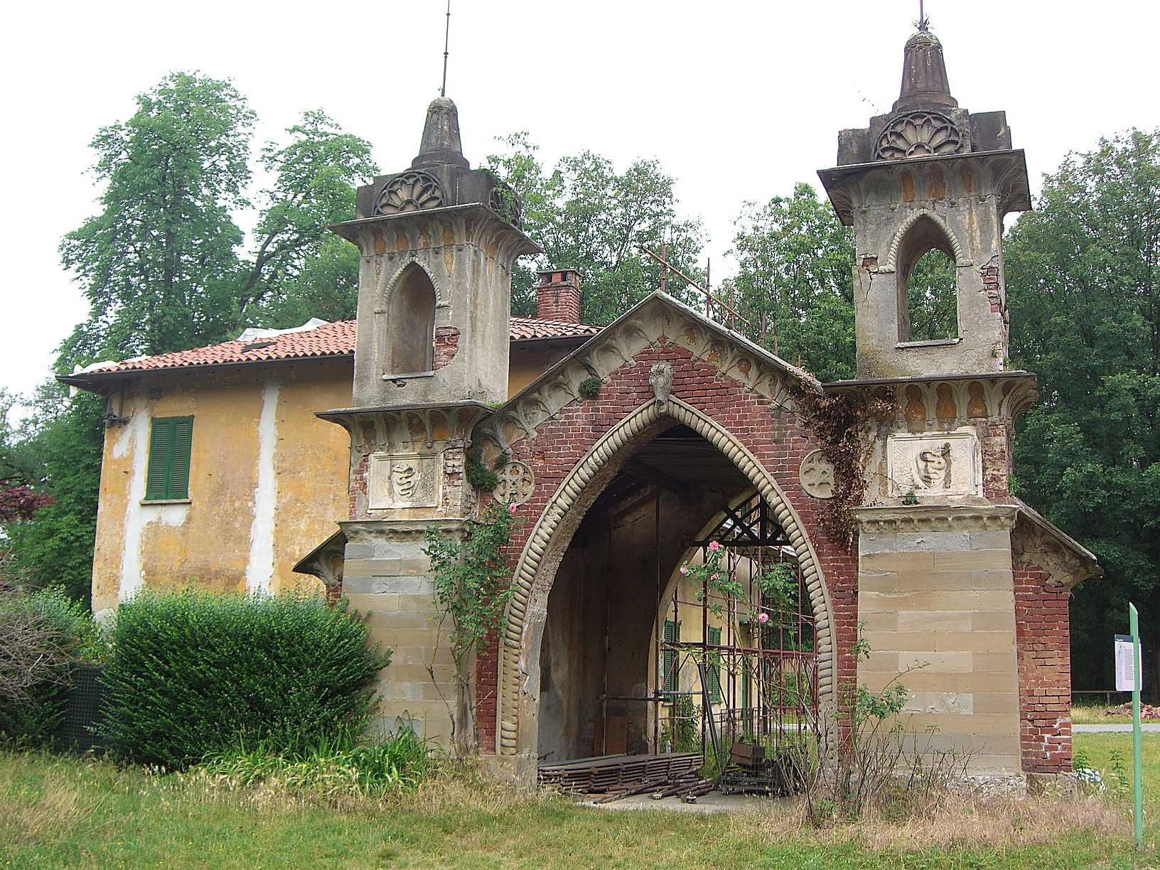 MB Monza Parco della Villa Reale - Cascina del Serraglio